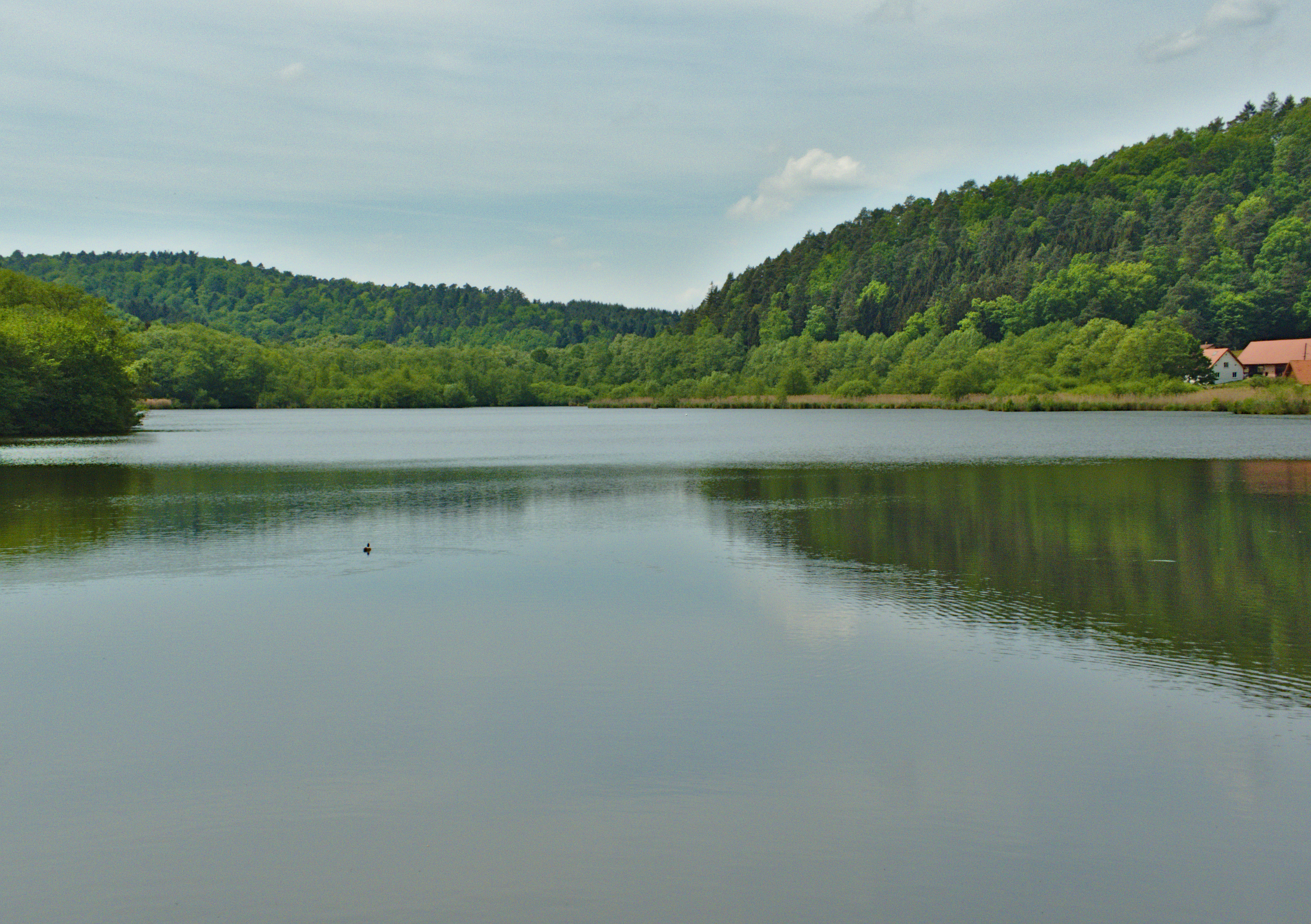 Etang Schmalenthalerweiher à 57230 Baerenthal - France